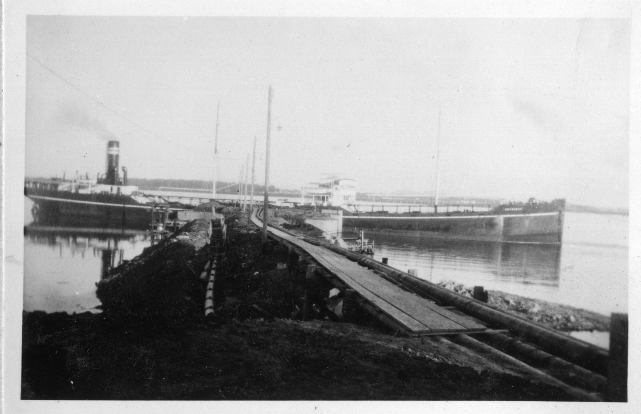 Bildet er hentet fra Arkivverket. W. Wilhelmsen, Tønsberg 10.300 TON.DW. Solgt til utlandet før krigen. V/Montreall Arkivinstitusjon : Statsarkivet i Kongsberg Arkivnavn : Telemark politikammer Sted : , , , Emneord: Skip, Hav, Båt Avbildet